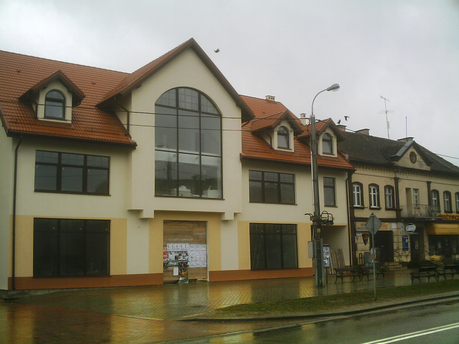 Rynek w Orzyszu